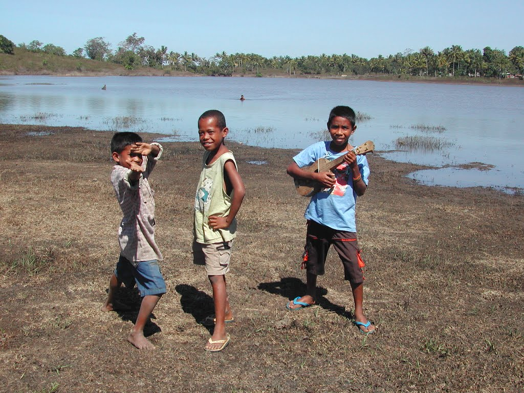 Children at shallow freshwater lake at Hatudo, Bauro